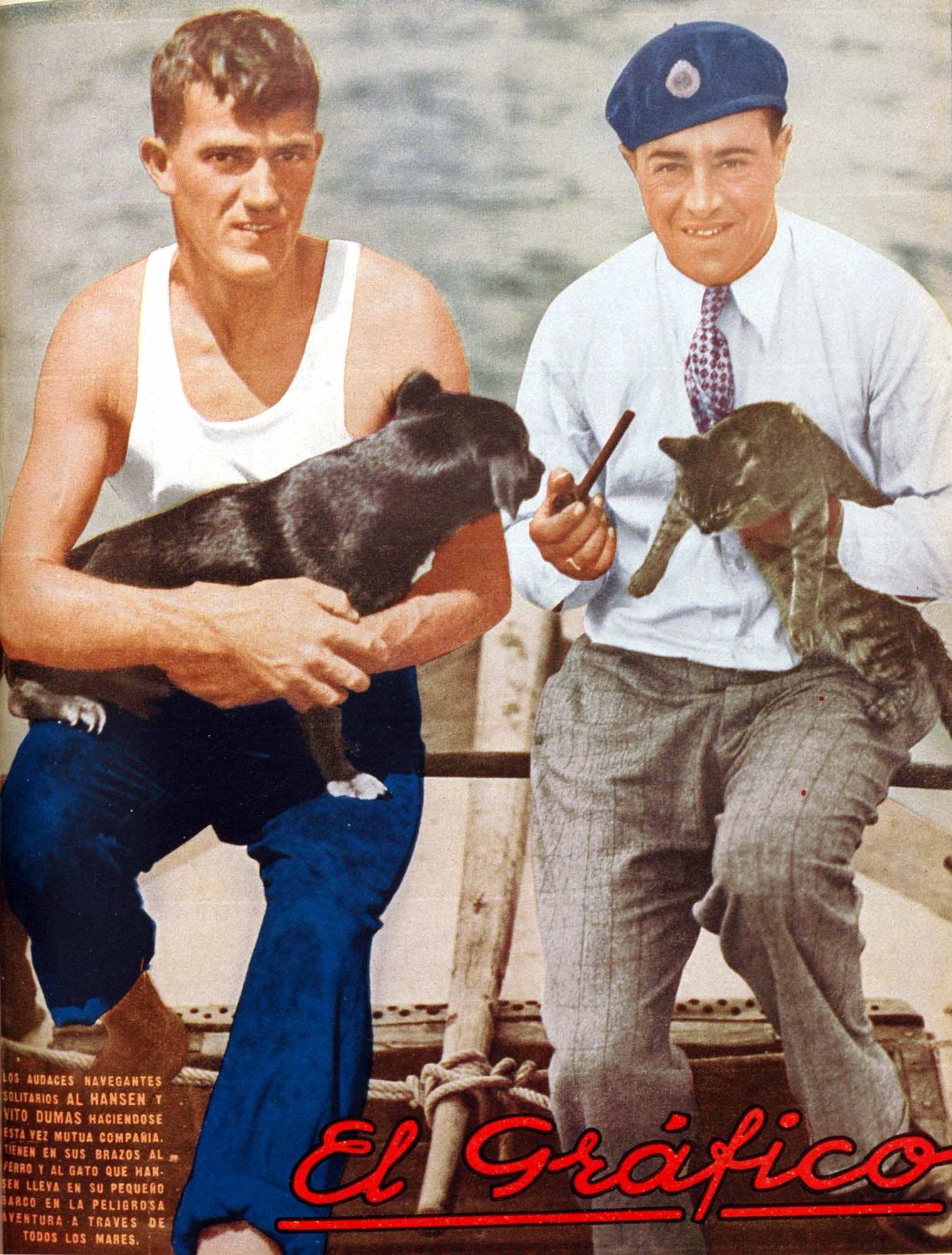 El Grafico del 10 de Marzo de 1934. Edicion 765